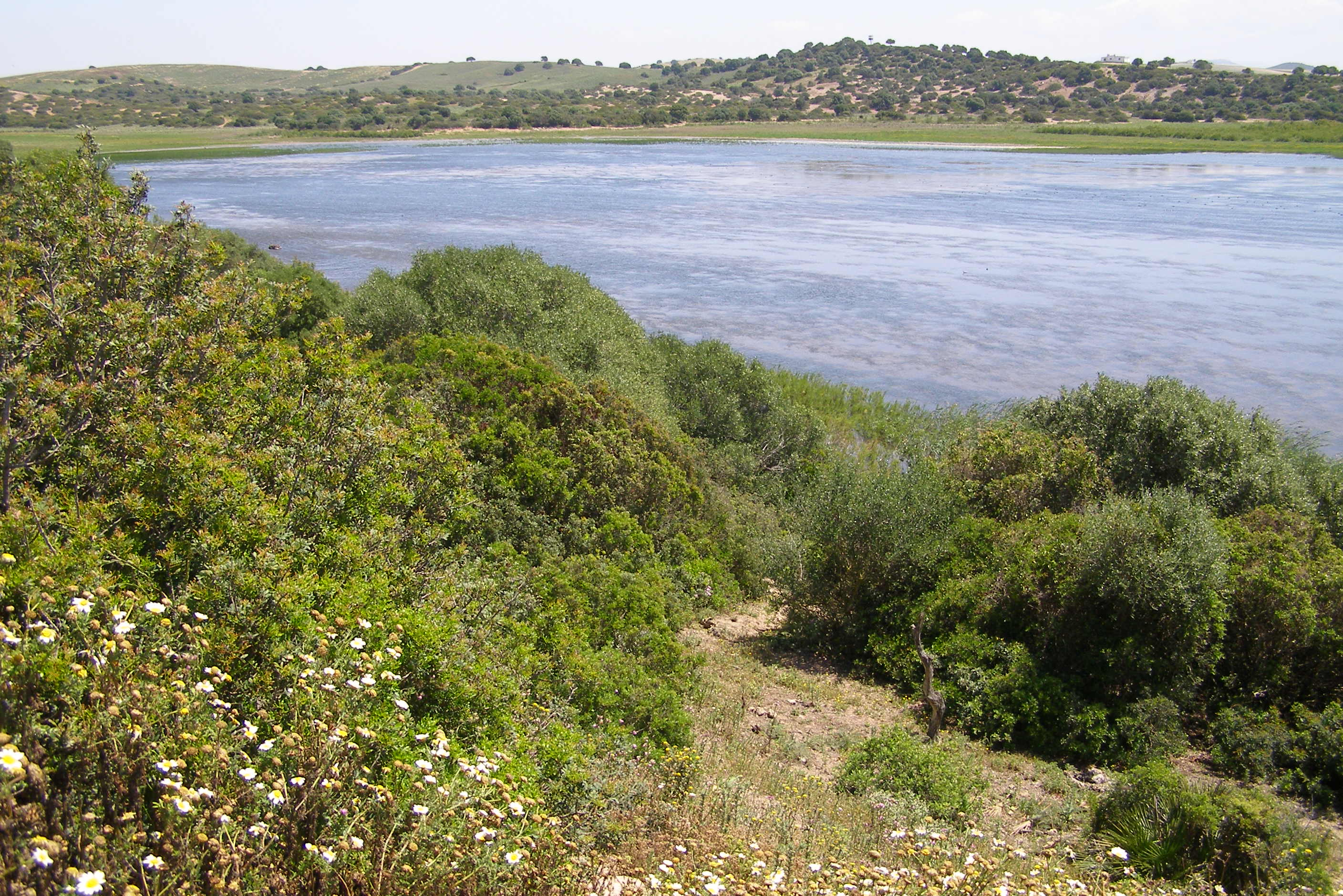 Complejo endorreico de Chiclana This is a photography of a Site of Community Importance in Spain with the ID: ES0000028. Natura2000 entry, EEA entry